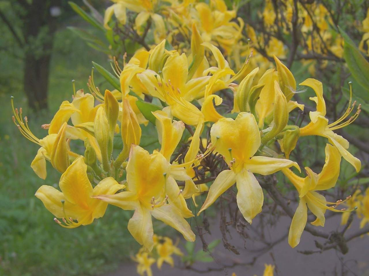 Rhododendron luteum (pl. różanecznik żółty, azalia pontyjska)